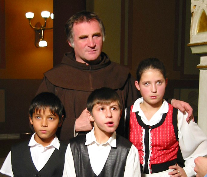 Csaba testvér gyermekeivel